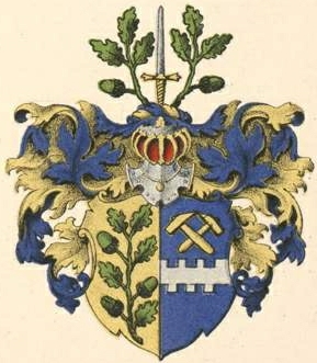 Gyllenschmidti suguvõsa aadlivapp